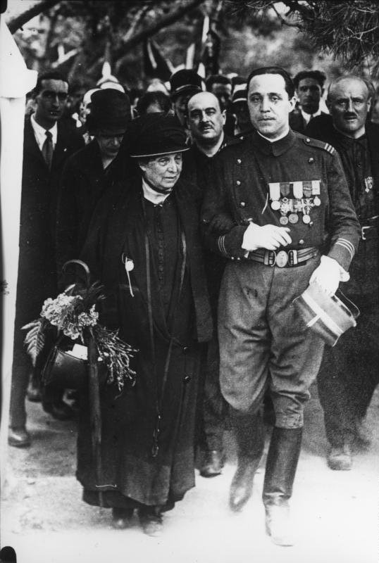 Der einzige Nachkomme des italienischen Freiheitskämpfers Garribaldi besucht mit seiner Mutter Constanza Garribaldi das Grab des italienischen Freiheitskämpfers in Caprera/Italien. Der einzige männliche Nachkomme des italienischen Freiheitskämpfers Garribaldi, Edzio Garribaldi mit seiner Mutter Donna Constanze Garribaldi nach dem Besuch des Grabes. Information added by Wikimedia users.